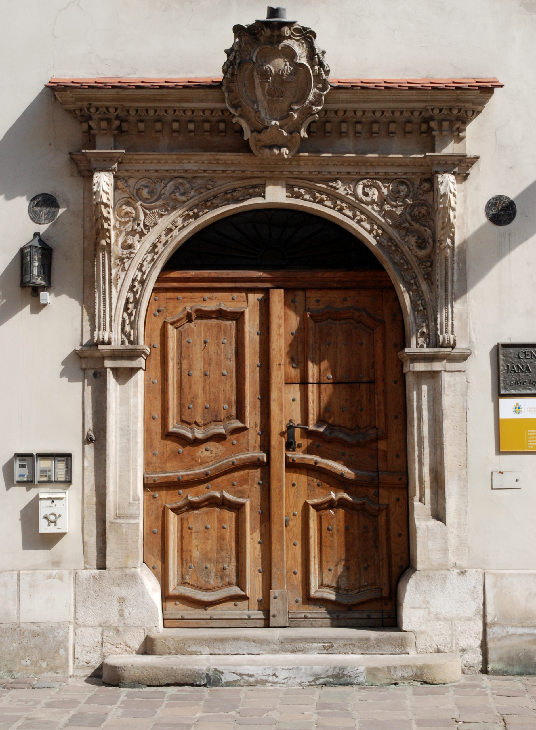 Portal do kamienicy przy ul. Kanoniczej 18 w Krakowie. Przypisywany Janowi Michałowiczowi z Urzędowa.